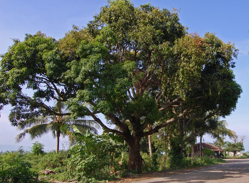 Mangifera laurina tree. Palabuhanratu, West Java, Indonesia